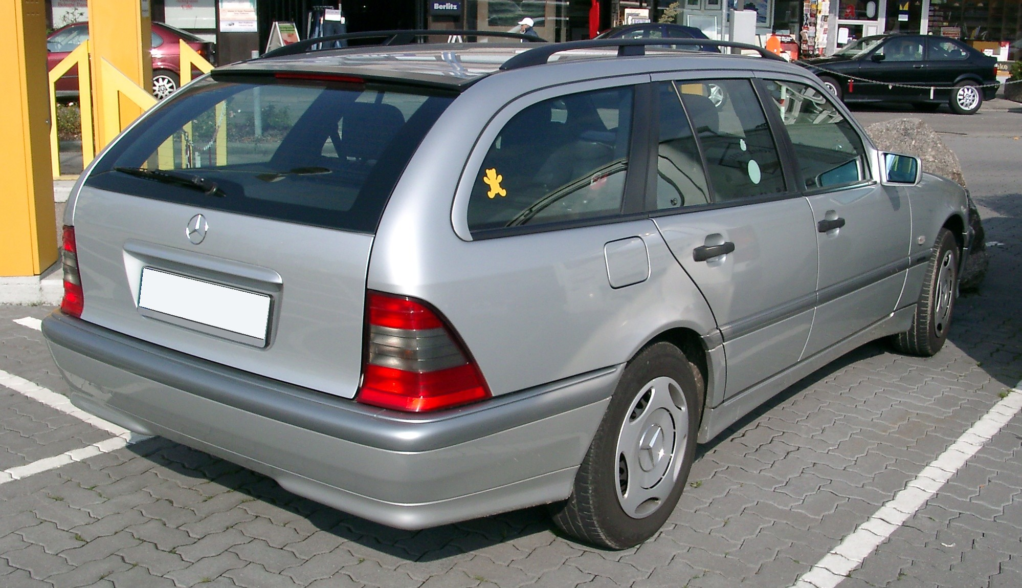 Mercedes-Benz W202 T-Modell